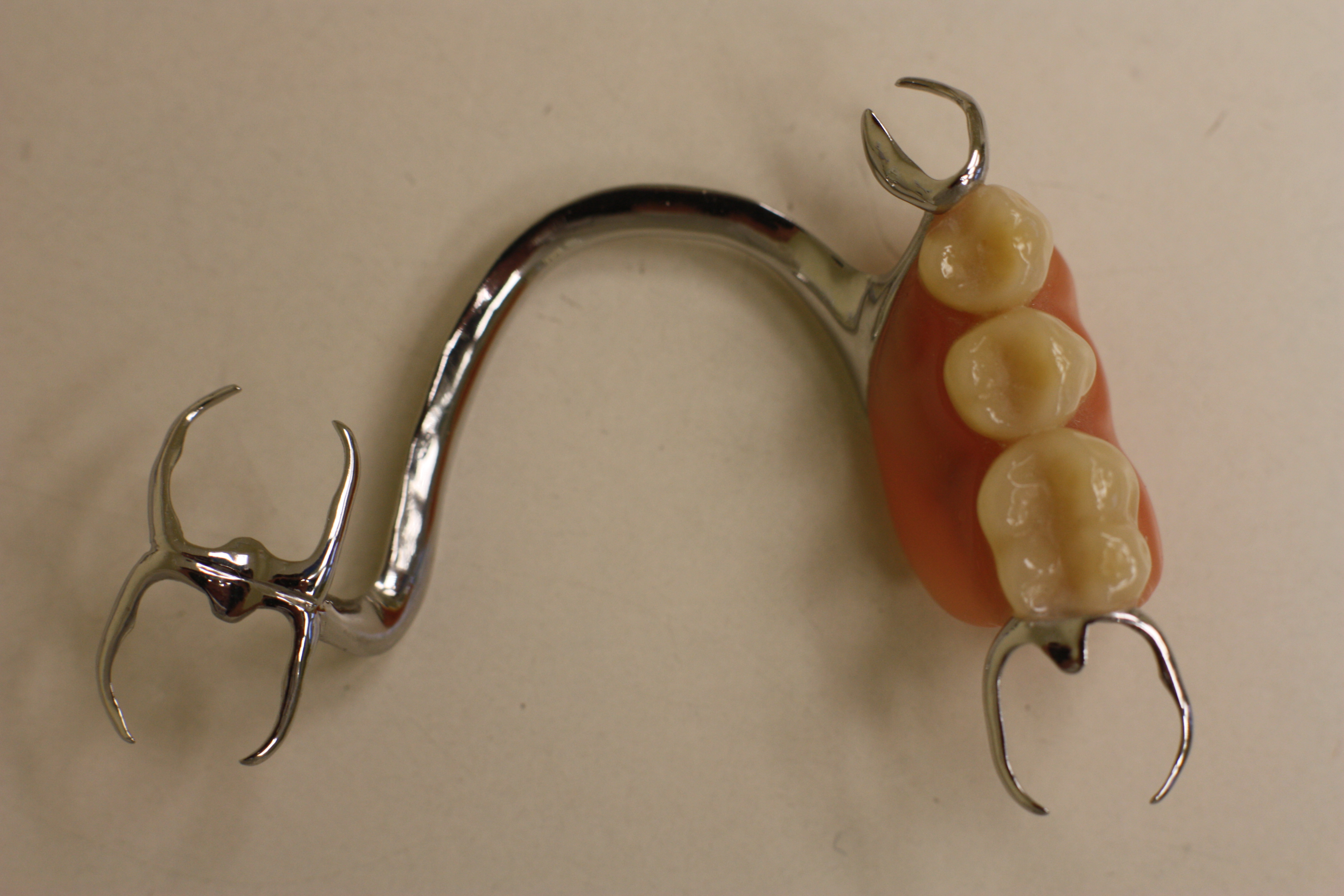 Teilprothese, Modellguss, Modellgussprothese